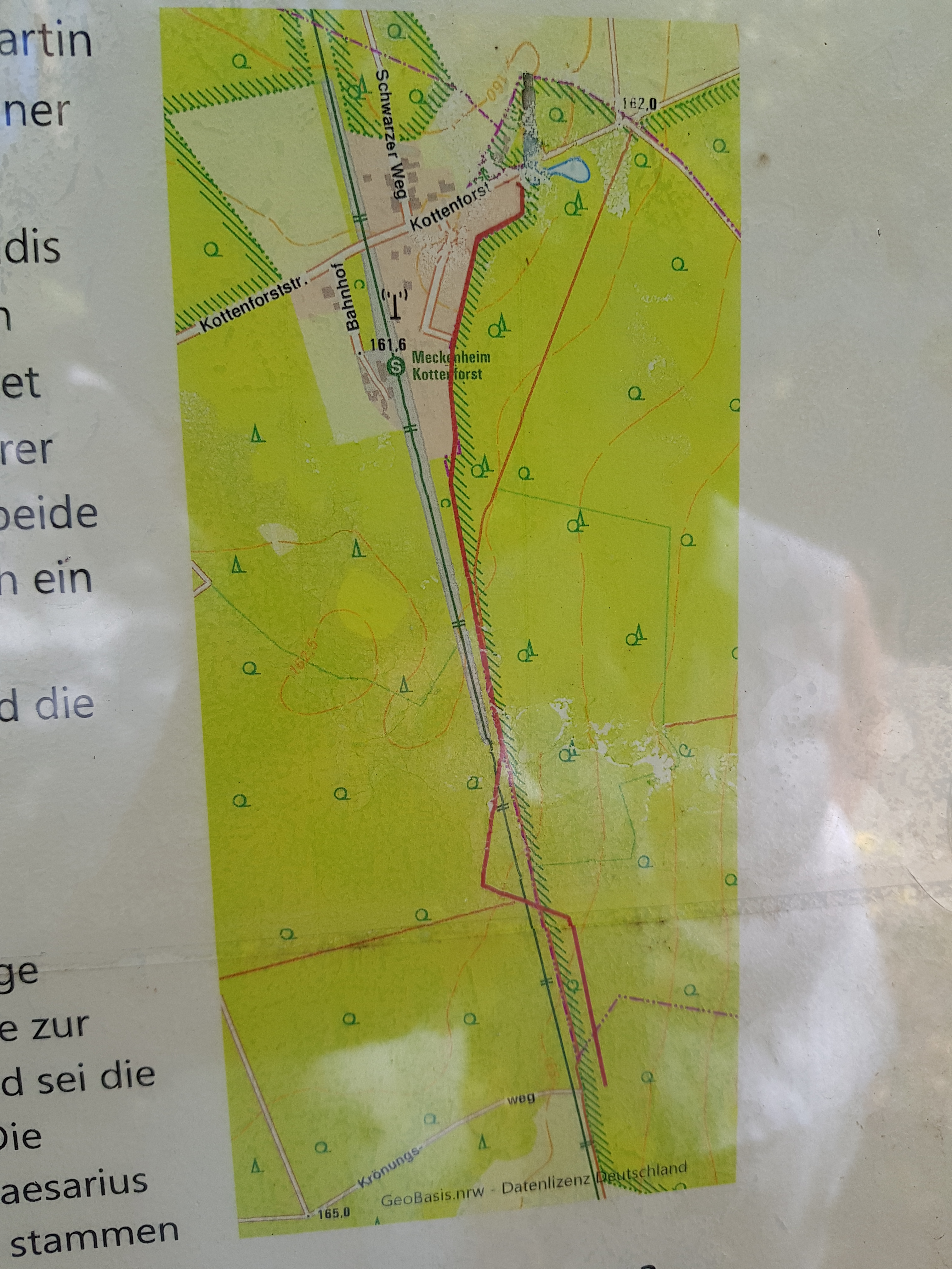 Der Kartenausschnitt zeigt die Lage der Stele am Fahweg beim nördlichen Ende des Lüfthildisgrabens und dessen Verlauf.